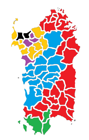 Situazione politica in Sardegna agli inizi del XIV secolo, prima dell'invasione aragonese. Rosso= Repubblica di Pisa, Verde = della Gherardesca, azzurro = Giudicato di Arborea, Giallo = Doria, Viola= Malaspina, Nero =Sassari